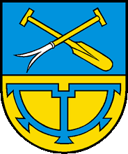 Wappen von Mühlehorn Kanton Glarus Schweiz